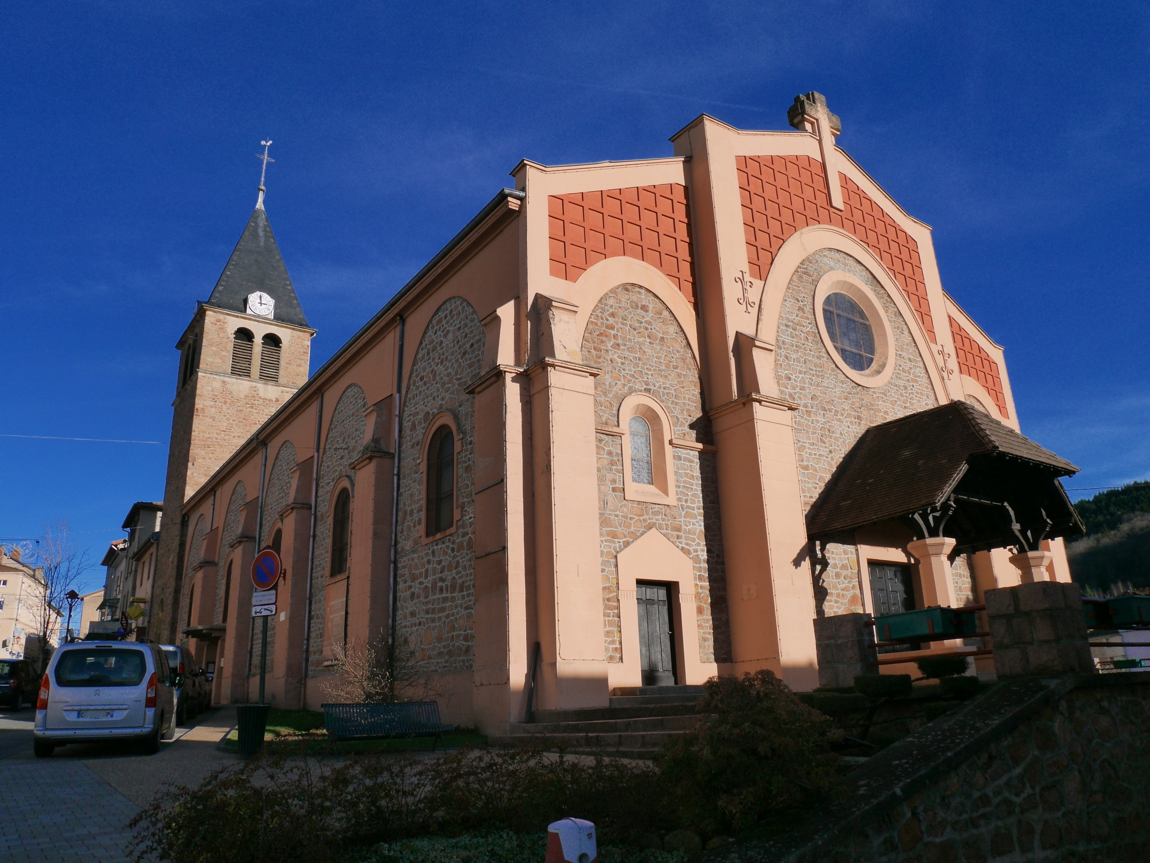 L'église Saint-Etienne de Cours-la-Ville